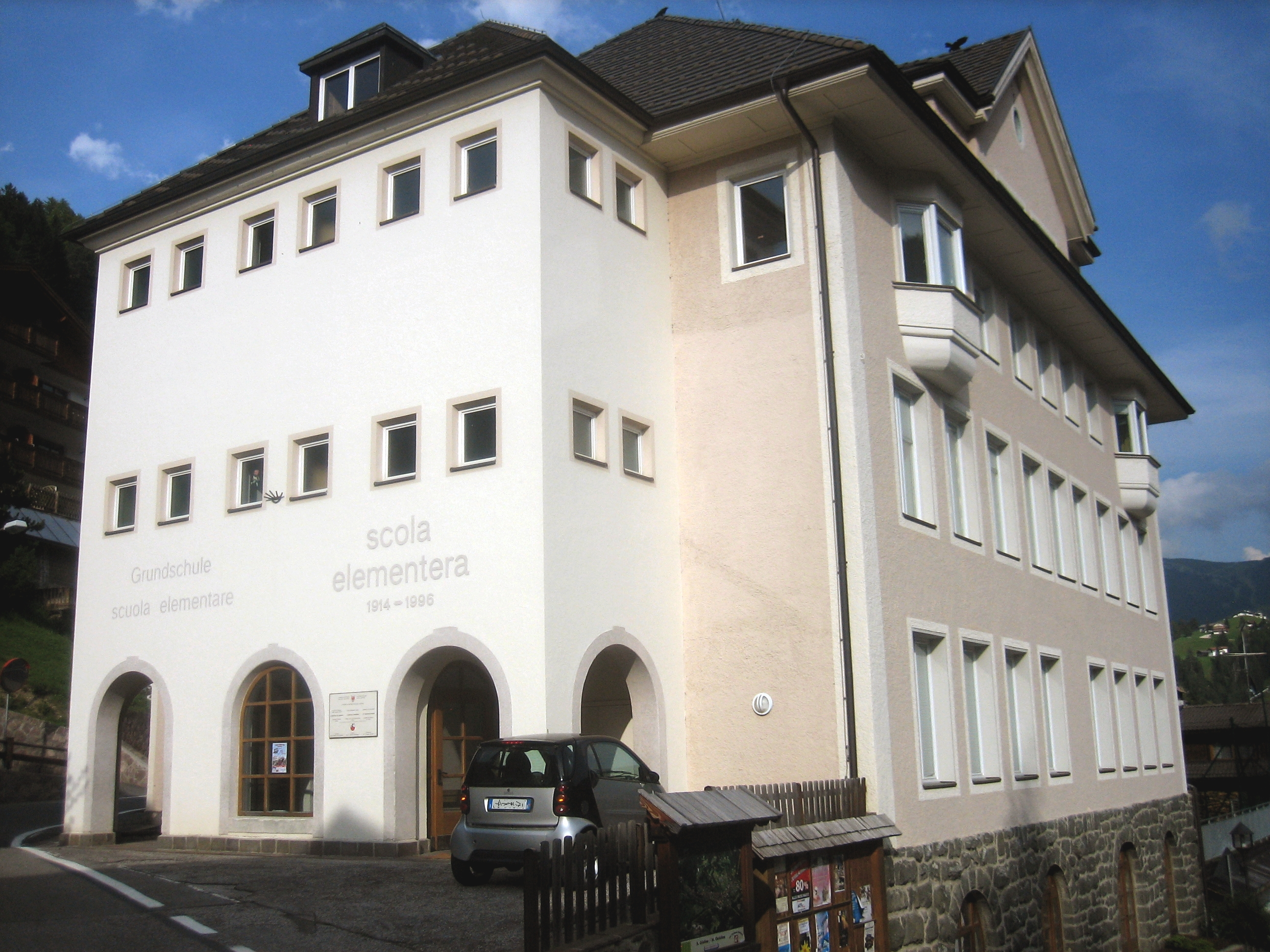 Grundschule